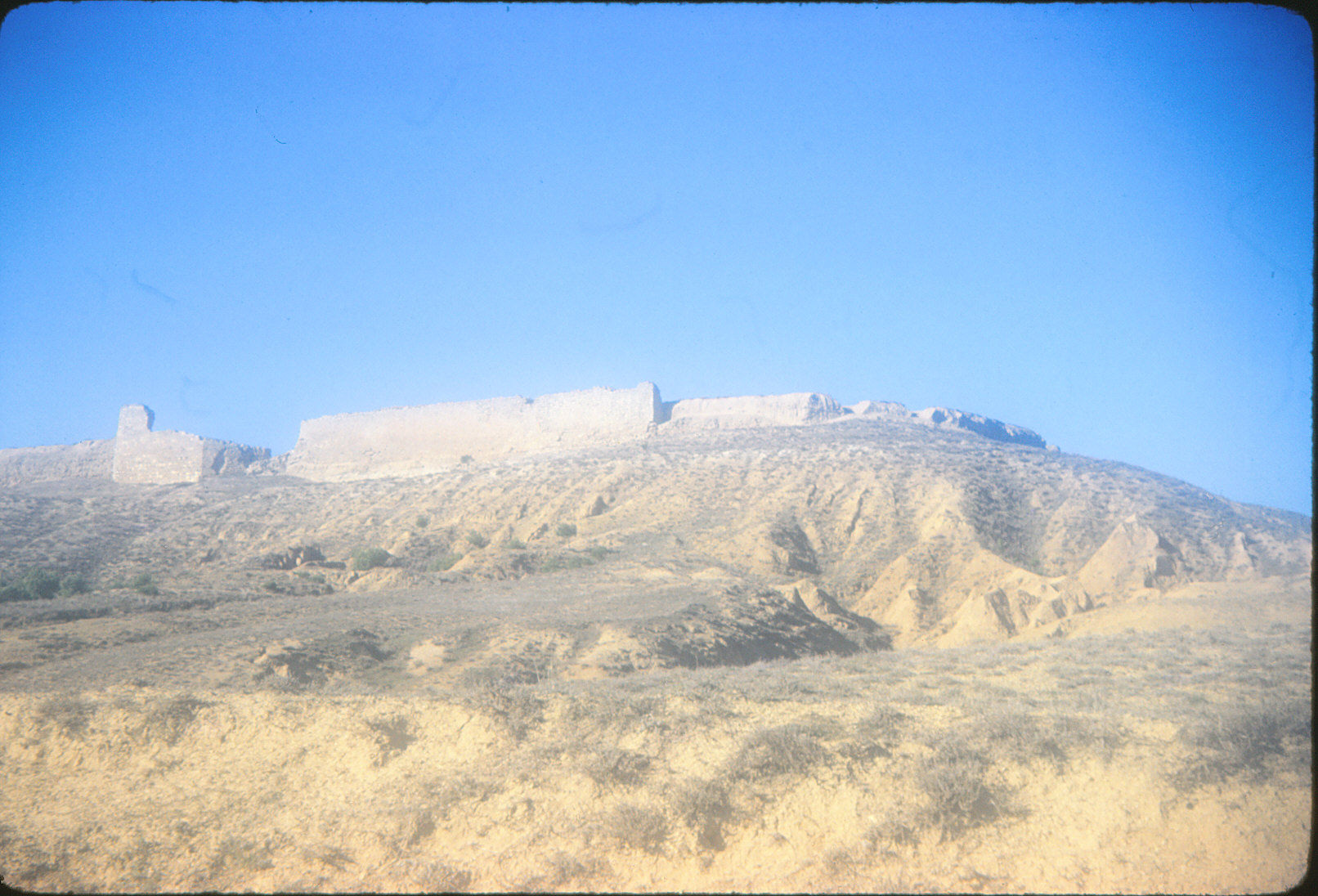 Resto de las murallas y entrada principal del Castillo de Tordehumos